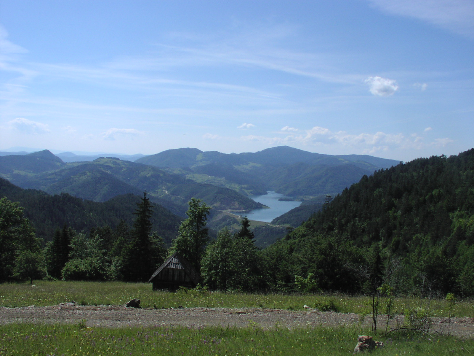 Tara - Jezero Perućac